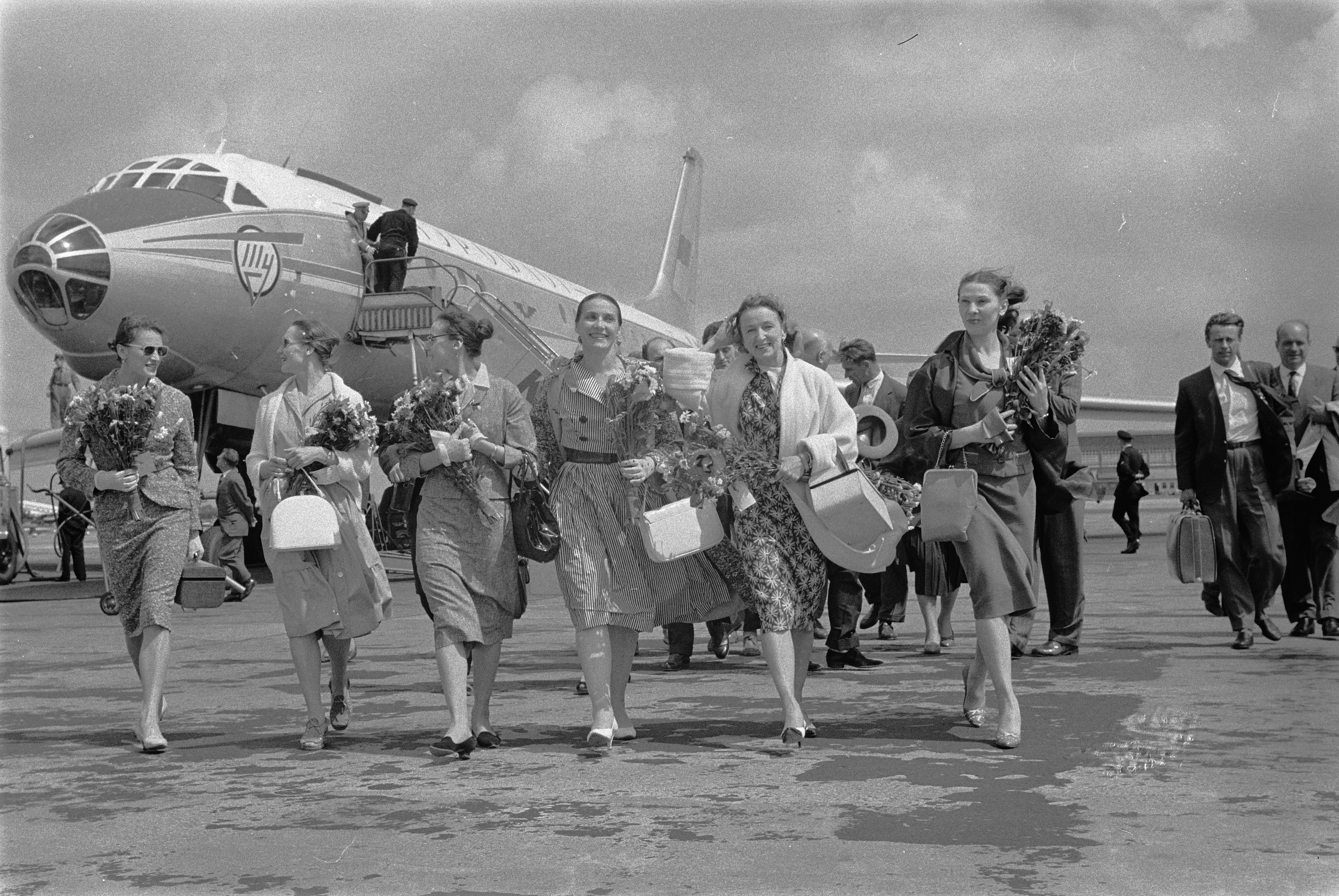 Collectie / Archief : Fotocollectie Anefo Reportage / Serie : [ onbekend ] Beschrijving : Aankomst solisten van het Bolshoiballet op Schiphol, de danseressen op het platform Datum : 9 juni 1960 Locatie : Noord-Holland, Schiphol Trefwoorden : DANSERESSEN, aankomsten, platforms, solisten Persoonsnaam : Bolshoiballet Fotograaf : Pot, Harry / Anefo Auteursrechthebbende : Nationaal Archief Materiaalsoort : Negatief (zwart/wit) Nummer archiefinventaris : bekijk toegang 2.24.01.05 Bestanddeelnummer : 911-3243